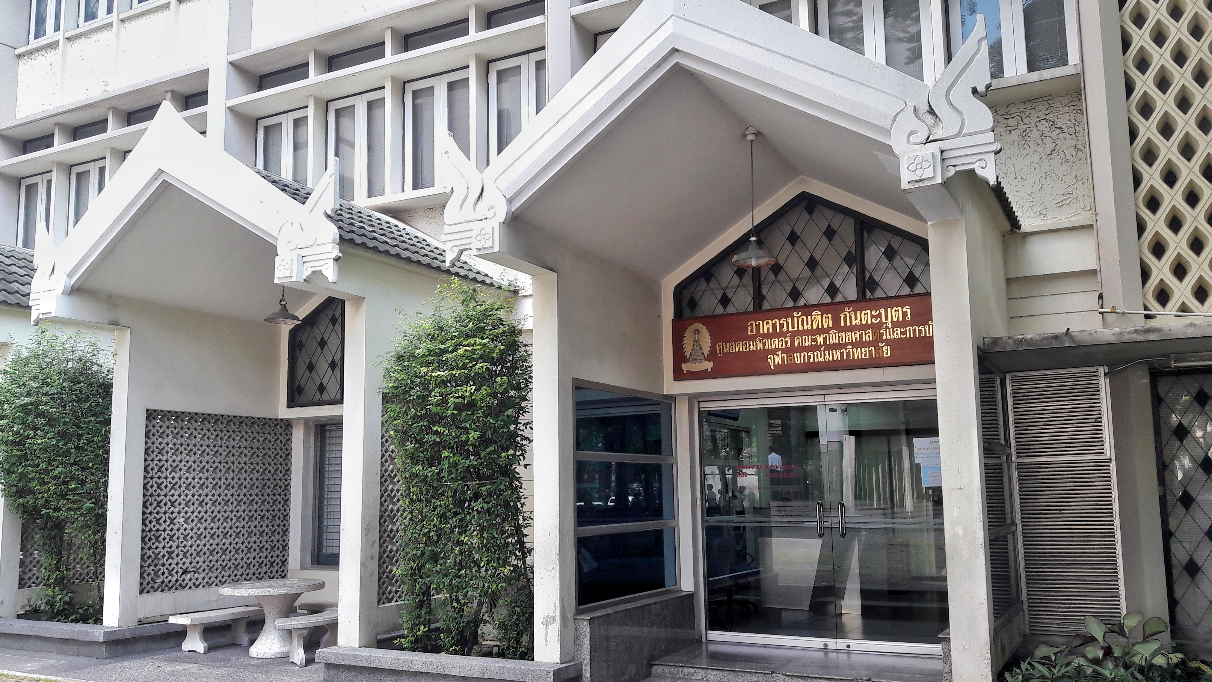 ศูนย์คอมพิวเตอร์ คณะพาณิชยศาสตร์และการบัญชี จุฬาลงกรณ์มหาวิทยาลัย